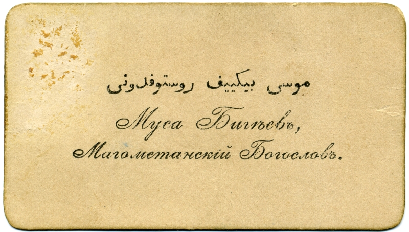 Визитная карточка М Бигеева